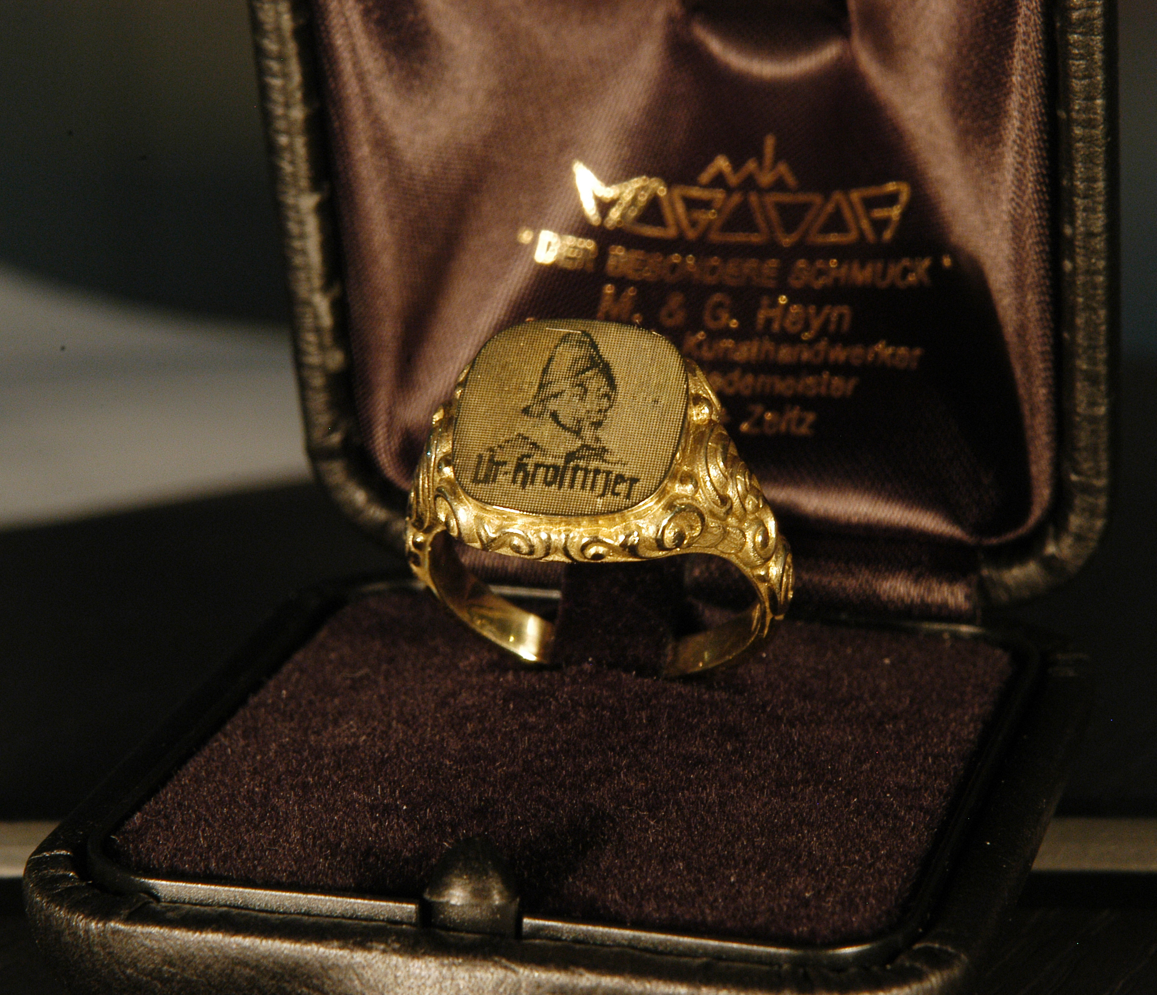 Der Gewinner des Ur-Krostitzer Jahresring erhält außerdem eine goldene Nachbildung des Ringes, den Schwedenkönig Gustav II. Adolf dem Krostitzer Brauereimeister 1631 als Dank für den wohlschmeckenden Labetrunk überreichte.